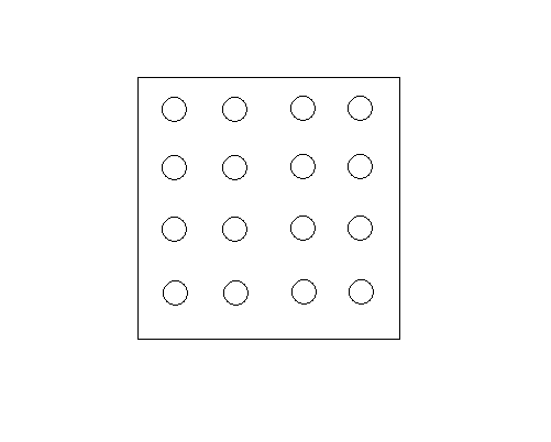 Grid supersämplimine